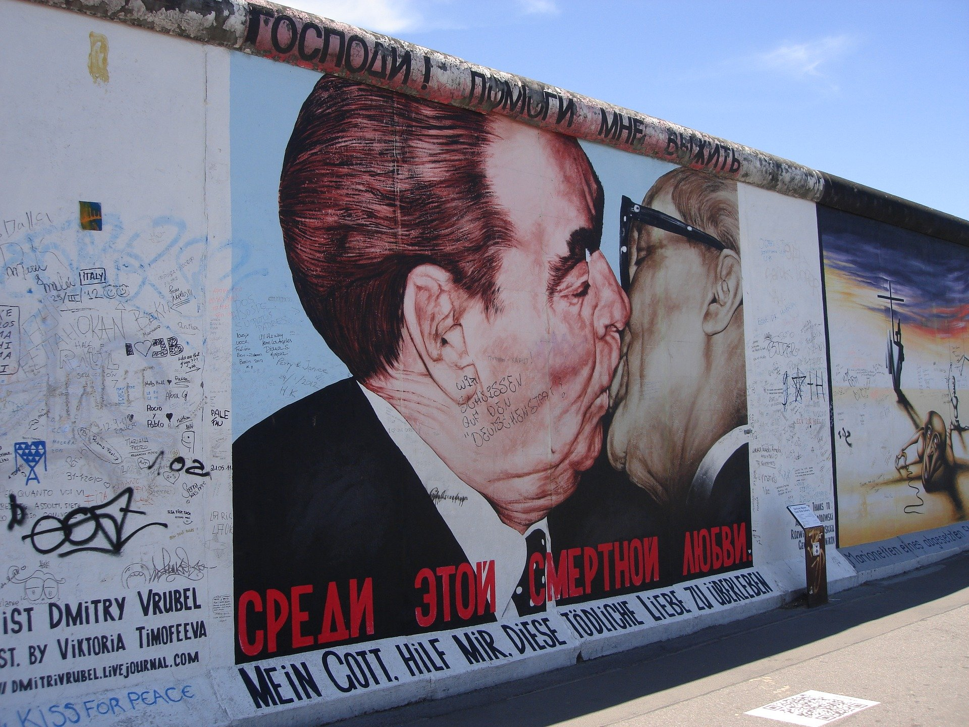 Fragment Muru Berlińskiego